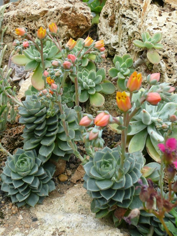 Botanischer Garten Erlangen, 2008